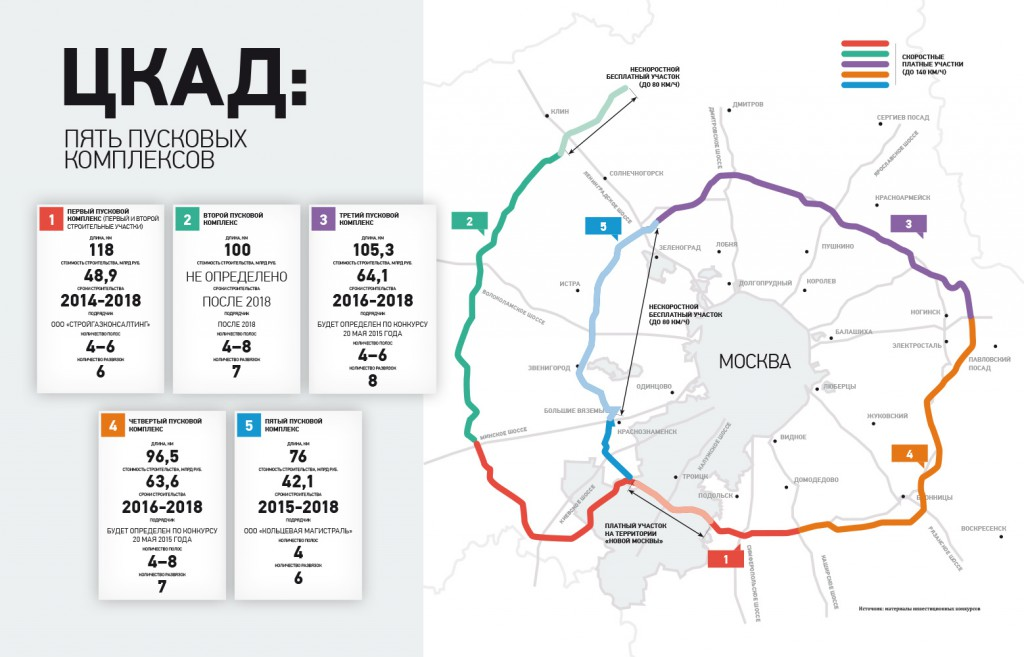 Пусковые комплексы ЦКАД